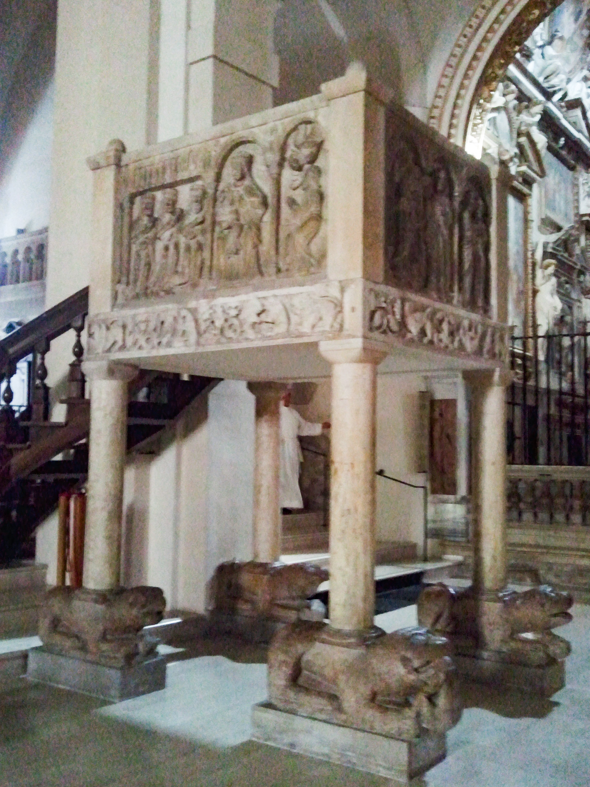 Duomo di Fano, pulpito